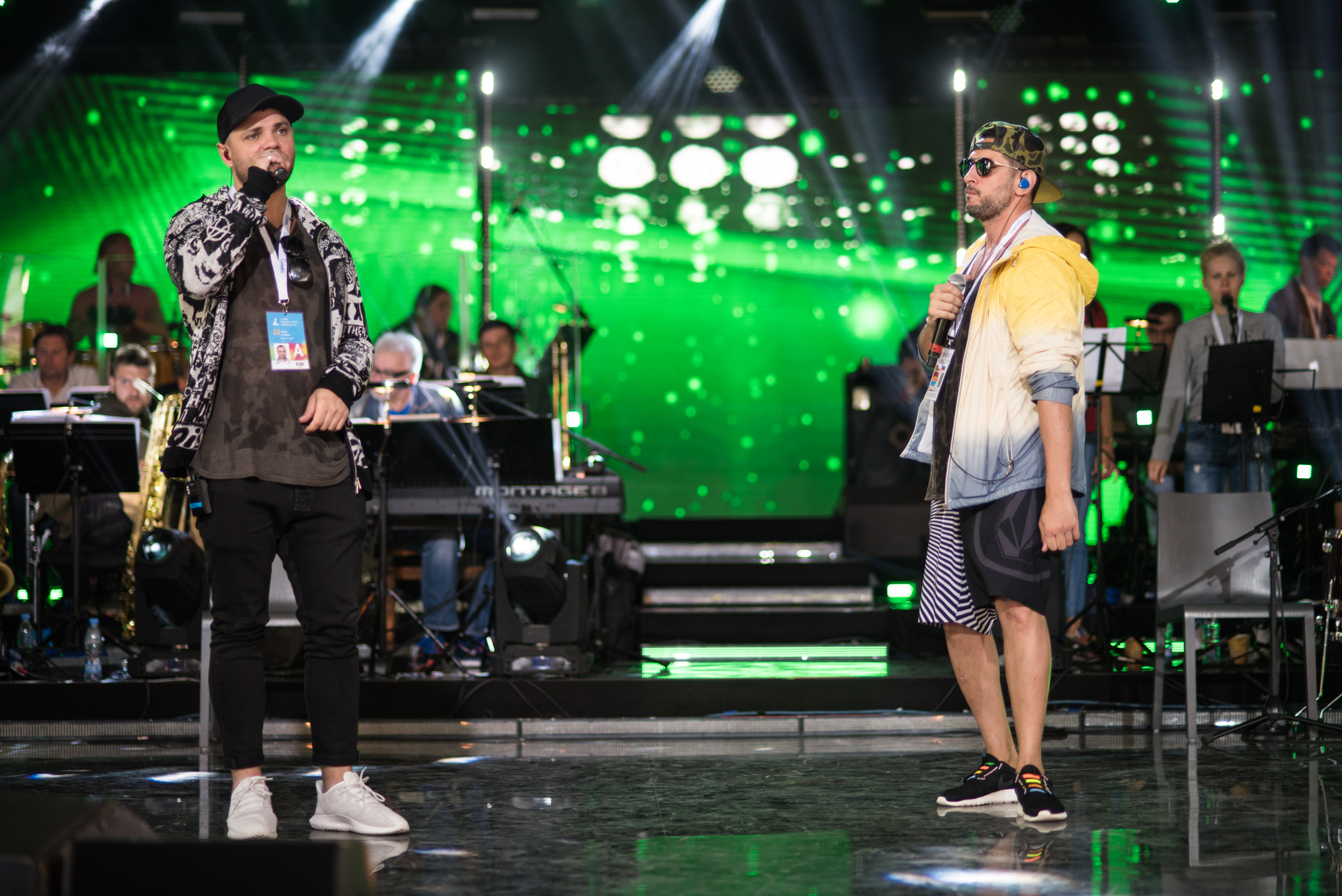 Группа Градусы на репетиции фестиваля «Лайма. Рандеву. Юрмала 2017»